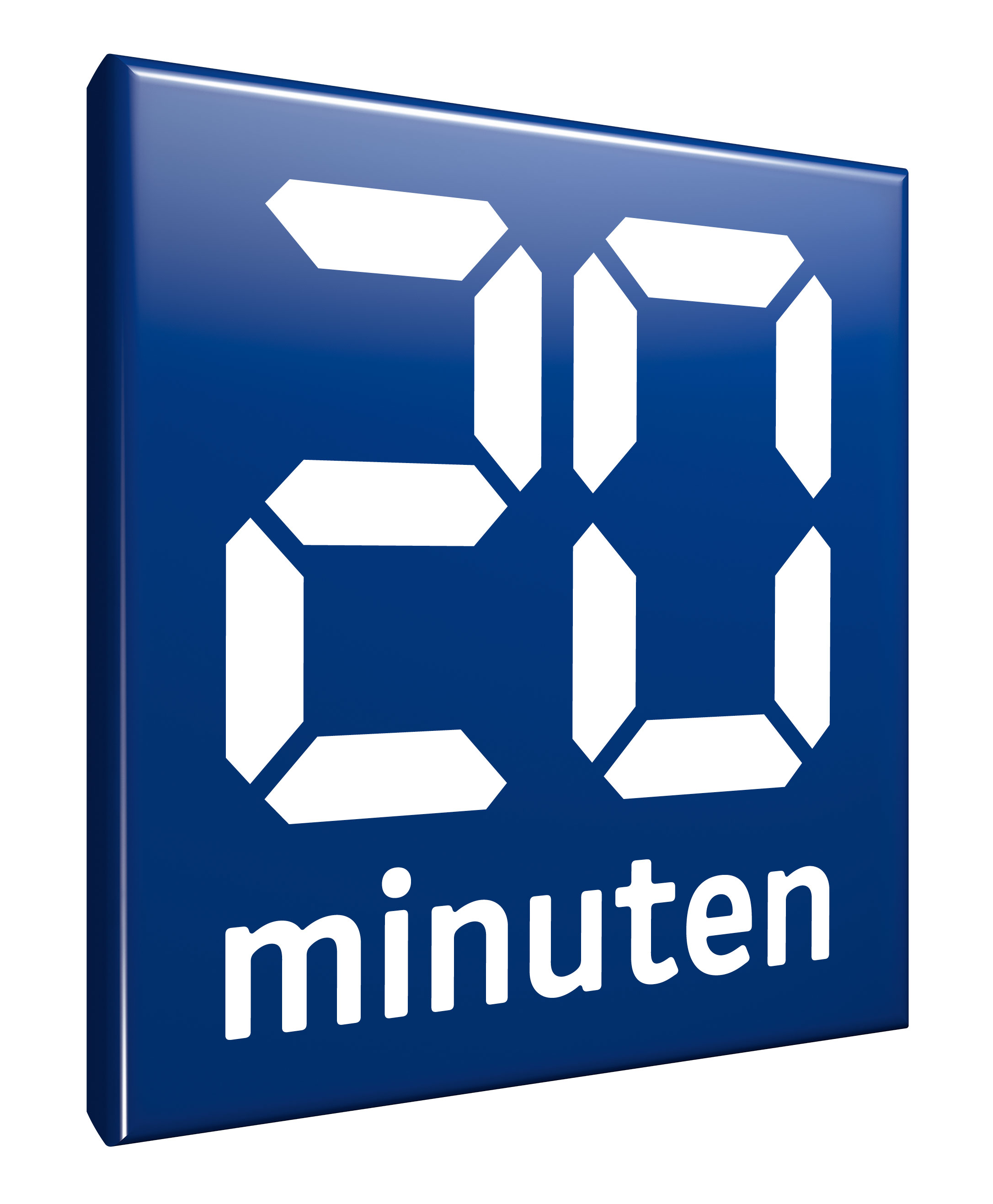 Logo von 20 Minuten, welches seit dem 6. Mai 2013 eingesetzt wird